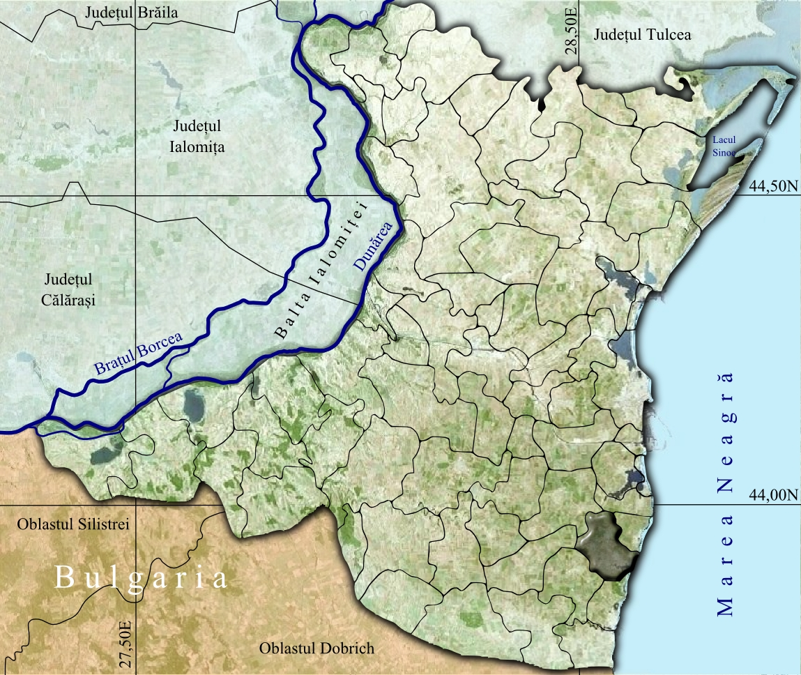 Comuna 23 August Constanta